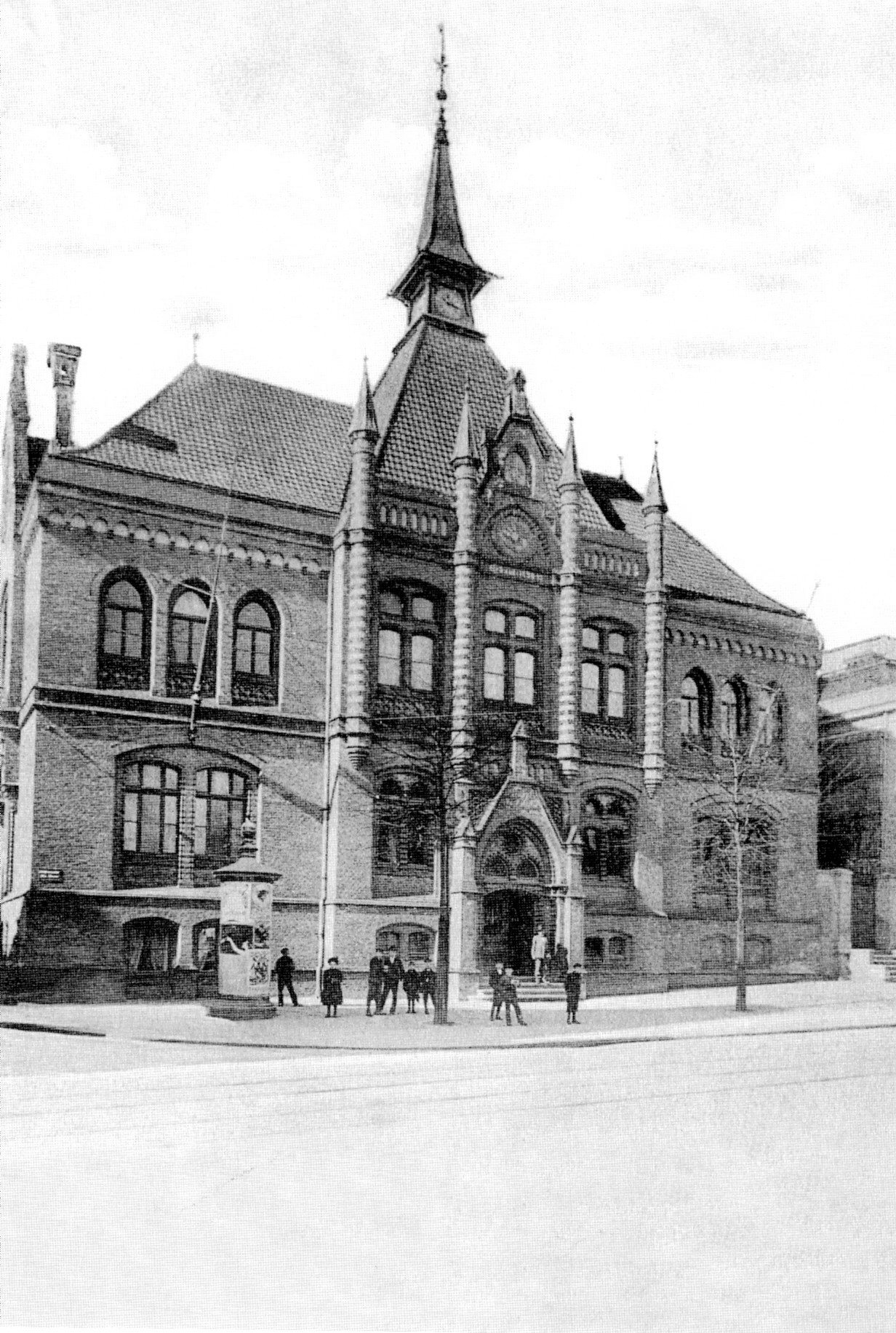 Die Haupt-Turnhalle in der Mühlenstraße wurde 1901 eingeweiht und war lange Zeit Lübecks größte Sporthalle. Nach der Bombardierung Lübecks im II. Weltkrieg in der Nacht zum Palmensonntag 1942 wurde die Halle zweckentfremdet, ein ausgebombtes Unternehmen wurde hier untergebracht. Seit 1991 steht das Gebäude unter Denkmalschutz. Die Aufnahme entstand kurz nach der Einweihung.